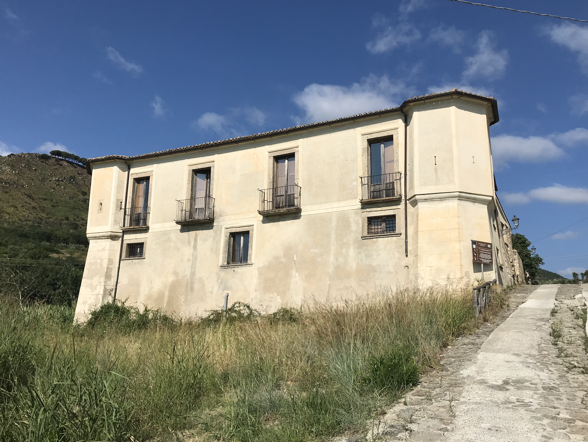 Il Palazzo o Casino Pepe (sec. XVII), a Staletti in frazione di Copanello